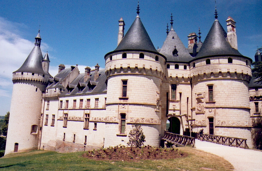 Chateau de Chaumont-sur-Loire